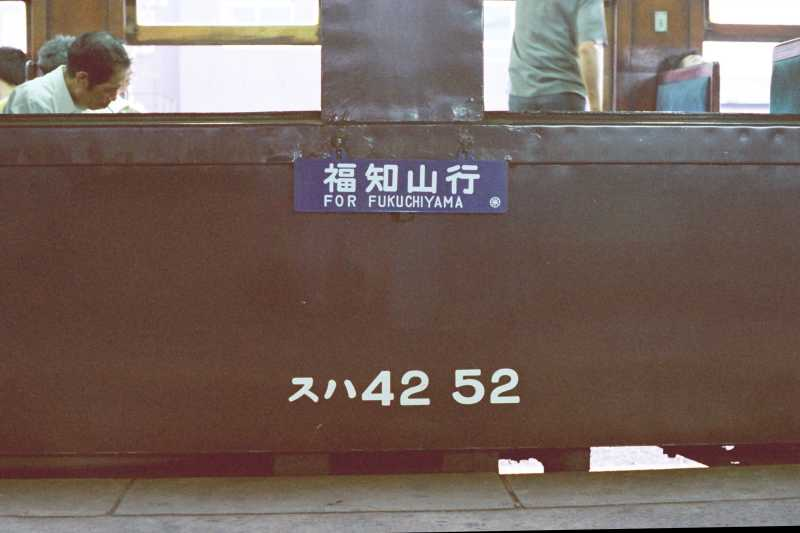 JNR Suha42 52（山陰本線824列車のスハ42 52。下関駅にて）Aug. 1978.